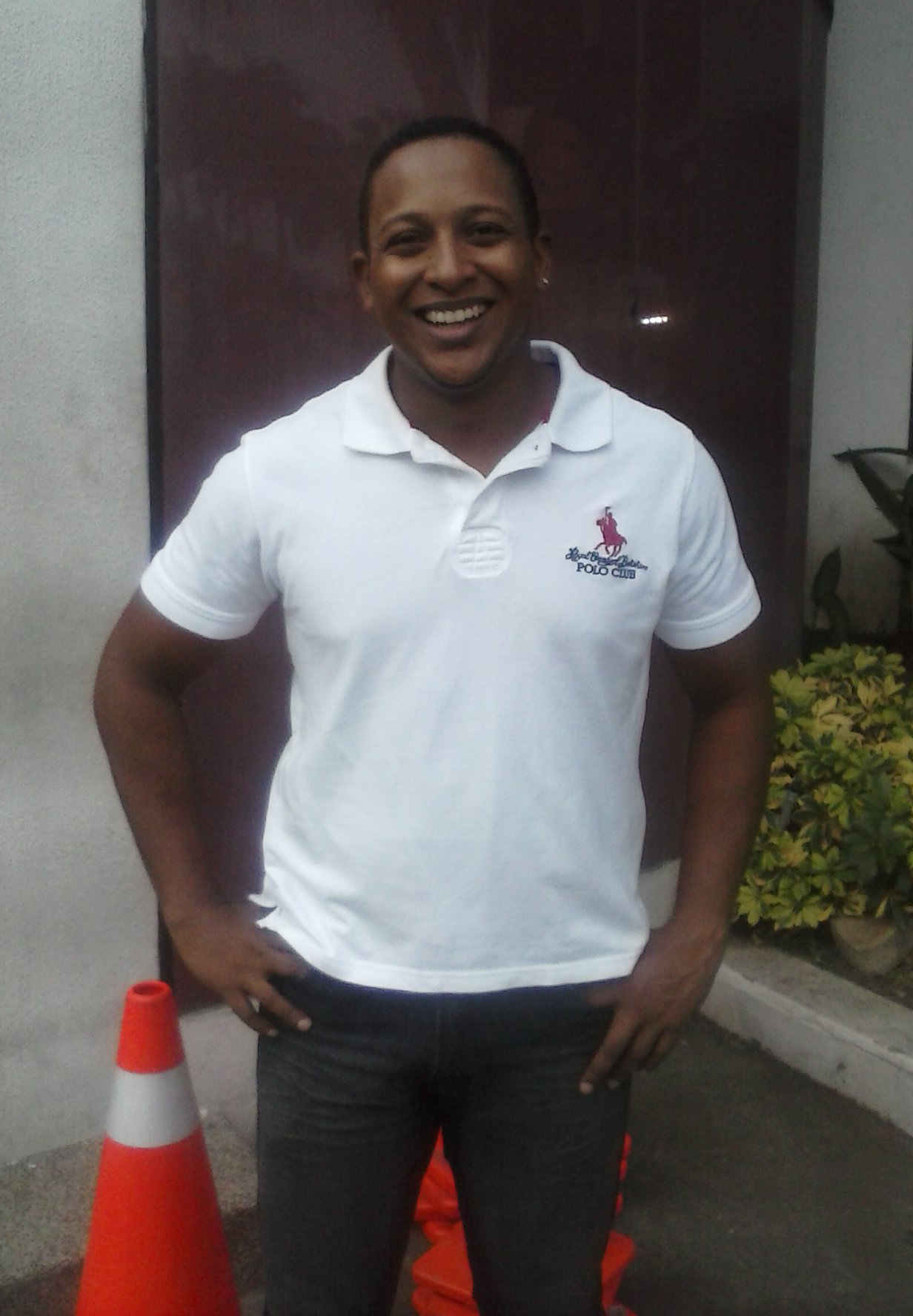 Ricardo González en las instalaciones de GamaTV, en 2014.